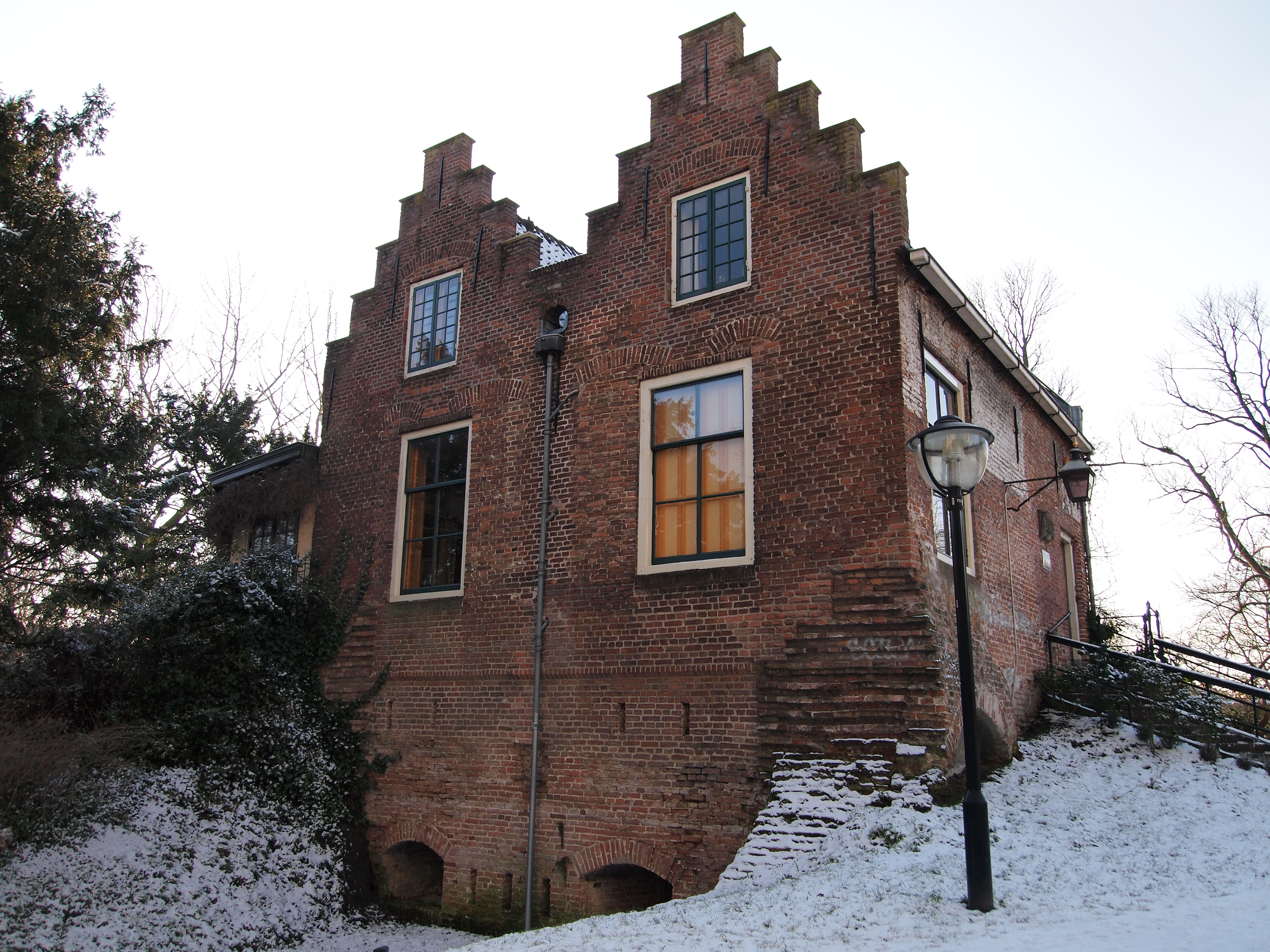 Bastion Sterrenburg Rijksmonumentnummer 18354, te Utrecht